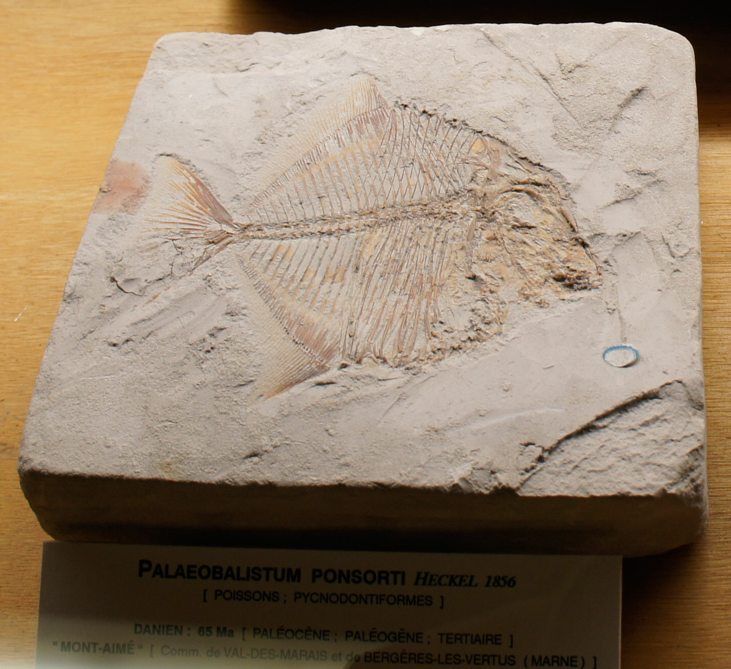 Présentation dans la Salle Dr Dorin et Thierry. Trouvé au Mont Aimé, communes de Val des marais et Bergères les Vertus.